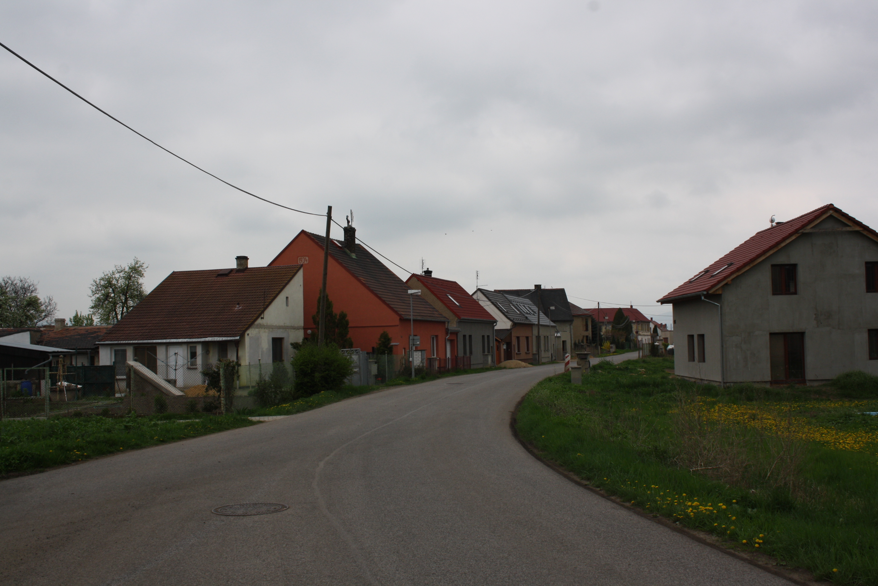 Zástavba domů v Keblicích.